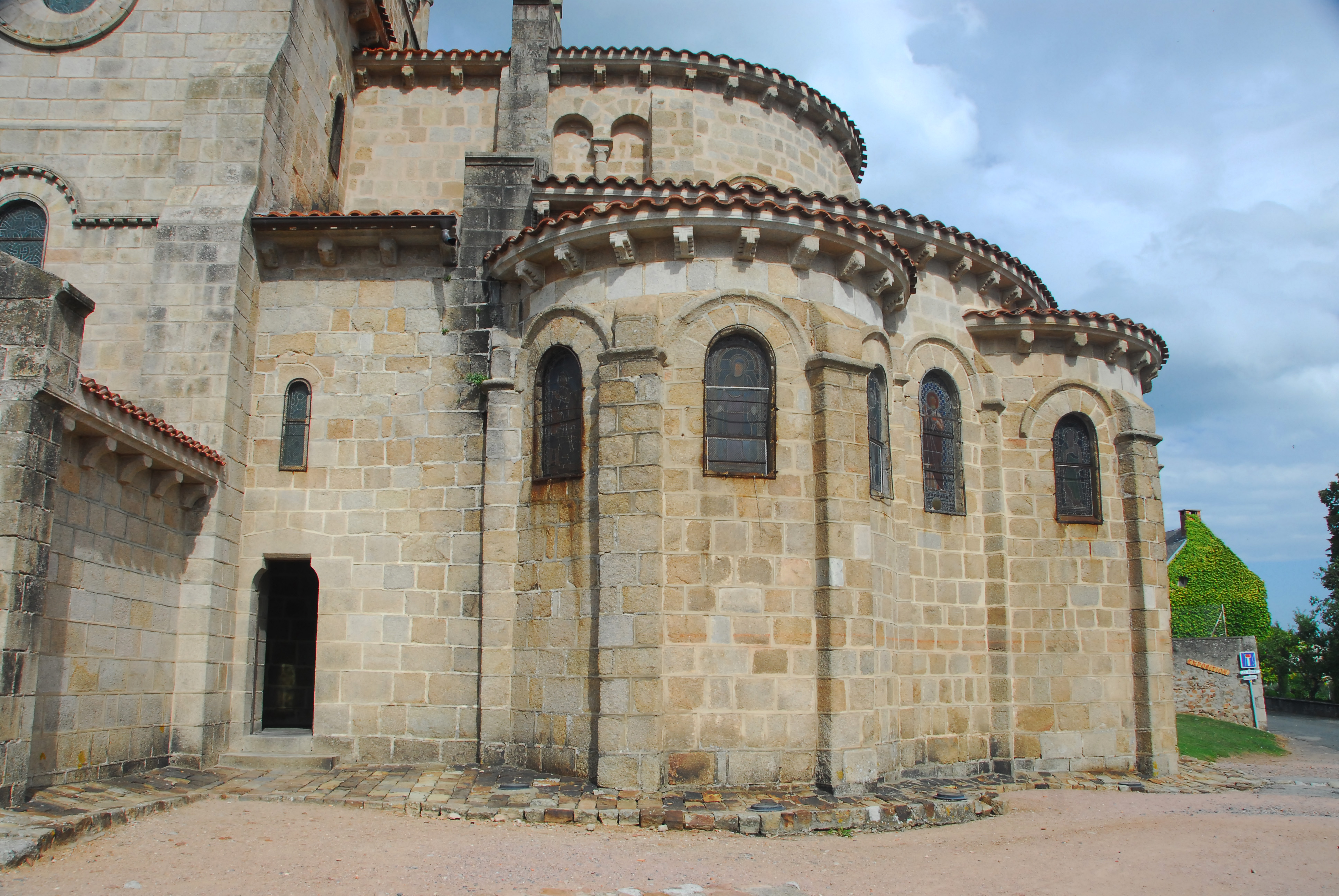 N.-D. de Châtel-Montagne, Chorhaupt von S